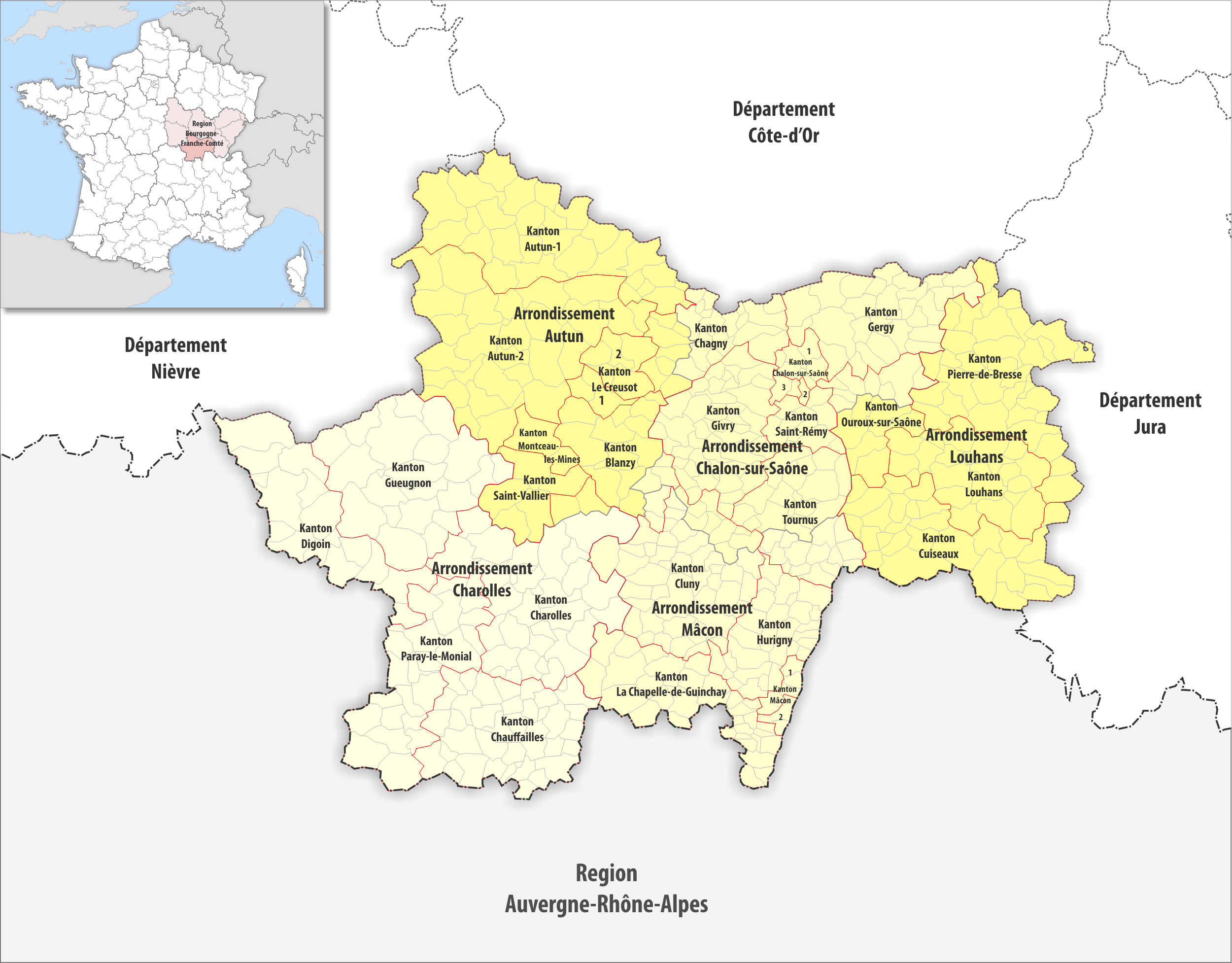 Gemeinden, Kantone und Arrondissemente im Departement Saône-et-Loire